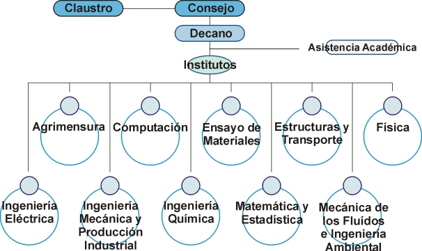 Organigrama Facultad de Ingenieria